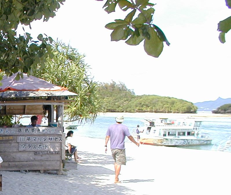 Kabira Bay Ishigaki jima, Glasboat service (石垣島の川平湾。投稿者撮影。)